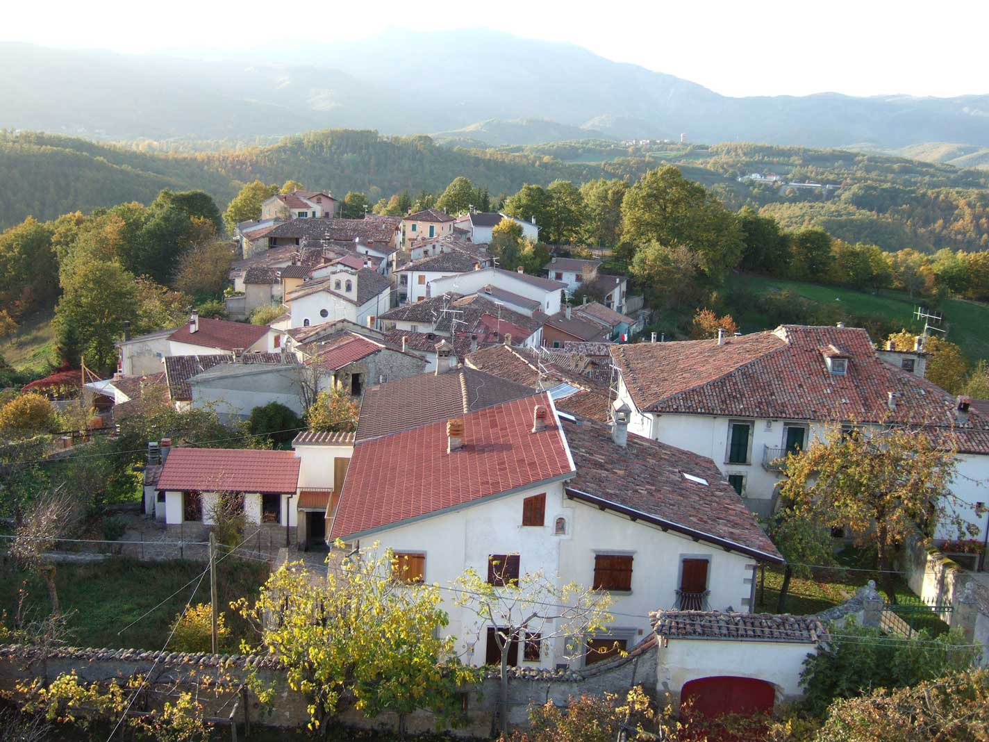 L'abitato di Configno